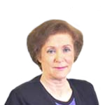 Diputada Eliana Caraball